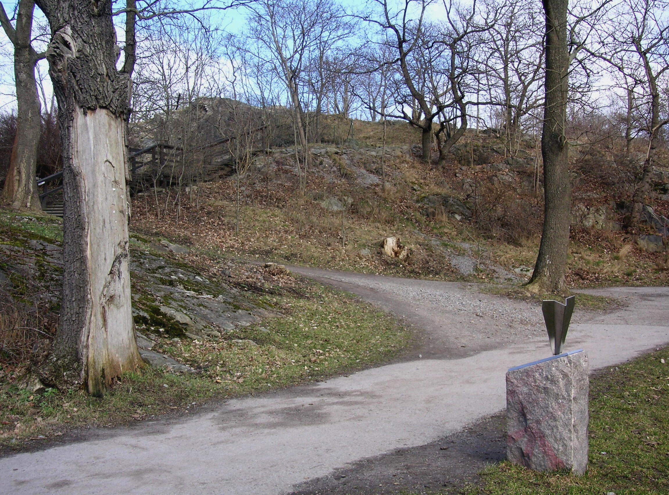 Haveriplatsen för JAS-planet på Långholmen, i föregrunden syns minnesmärket, en papperssvala i rostfritt stål. I bakkrunden syns trädet som fortfarande bär spår av eldsvådan i samband med störtningen.